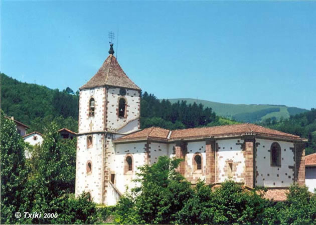 Eglise de Sumbilla Pyrénées).